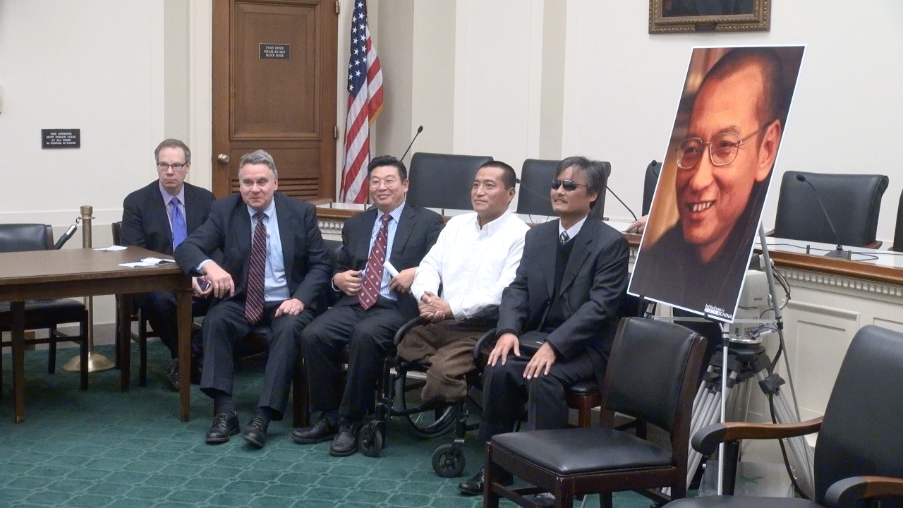 美國眾議員克里斯·史密斯，和中國人權活動人士楊建利、方政、陳光誠等人，在國會山舉行記者會，紀念劉曉波獲得諾貝爾和平獎五週年。（2015年12月9日）